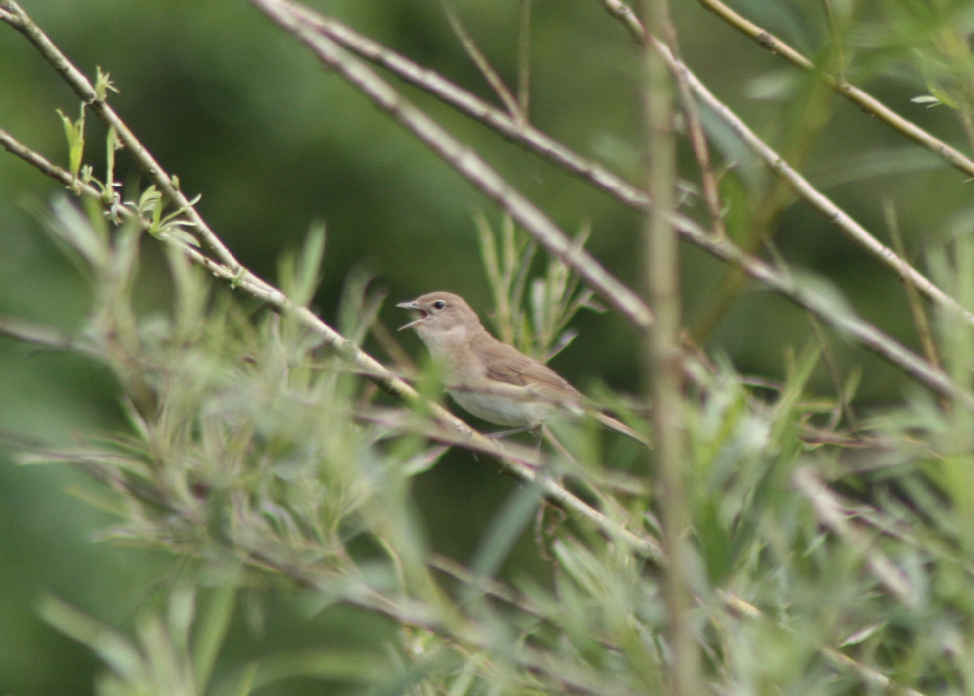 Gartengrasmücke